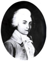 Count Karl Friedrich von Rehbinder AD 1764-1841 (founder of Saku brewery in Estonia) 1764-1841.